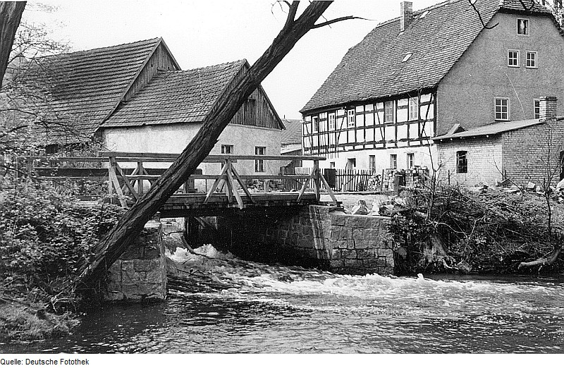 Original image description from the Deutsche Fotothek Schwepnitz-Cosel. Bollbuck Mühle, Ansicht über den Saleskbach